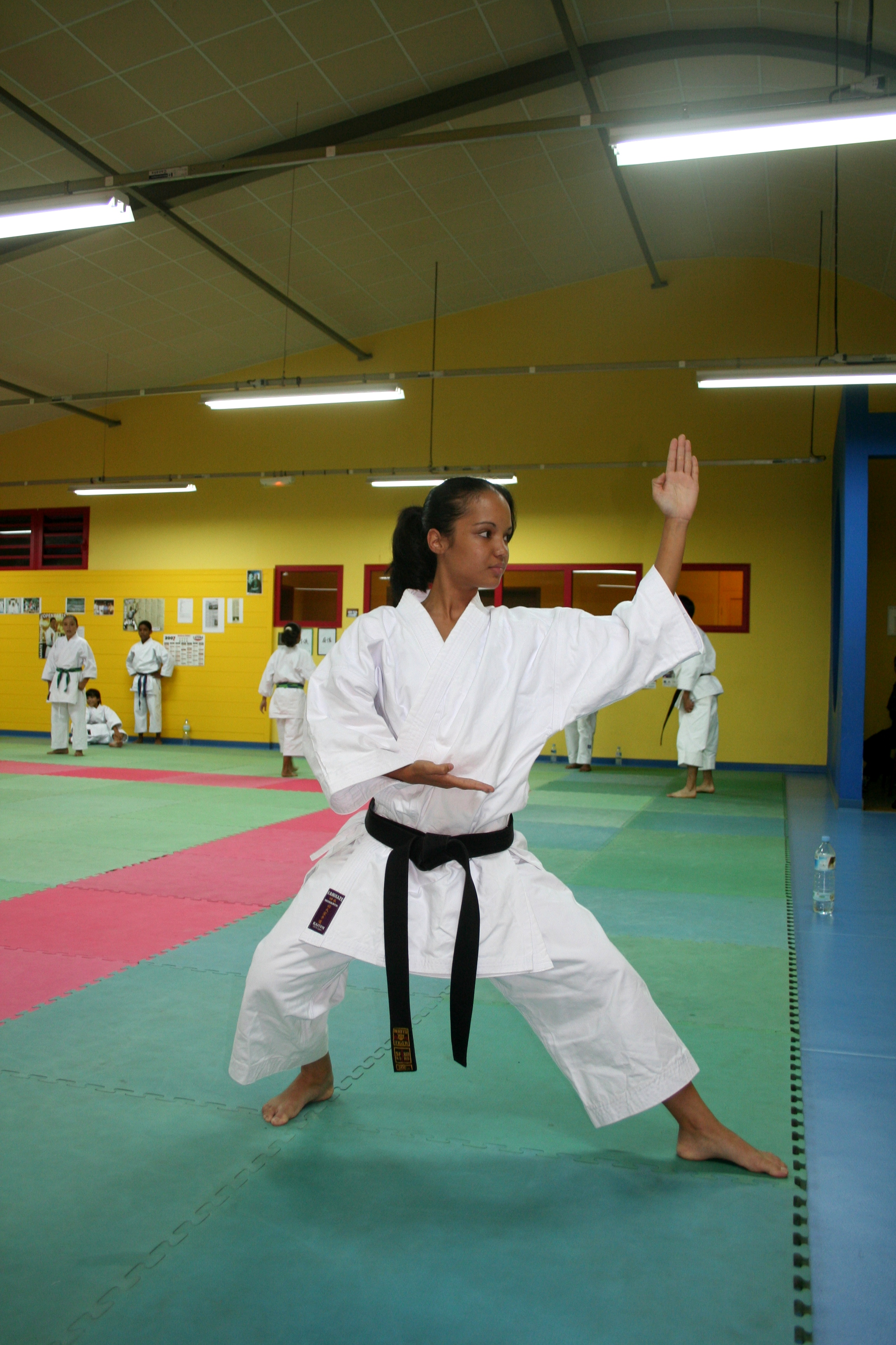 La championne du monde cadette de karaté kata Emmanuelle Fumonde effectuant une démonstration dans un dojo réputé de Sainte-Suzanne.